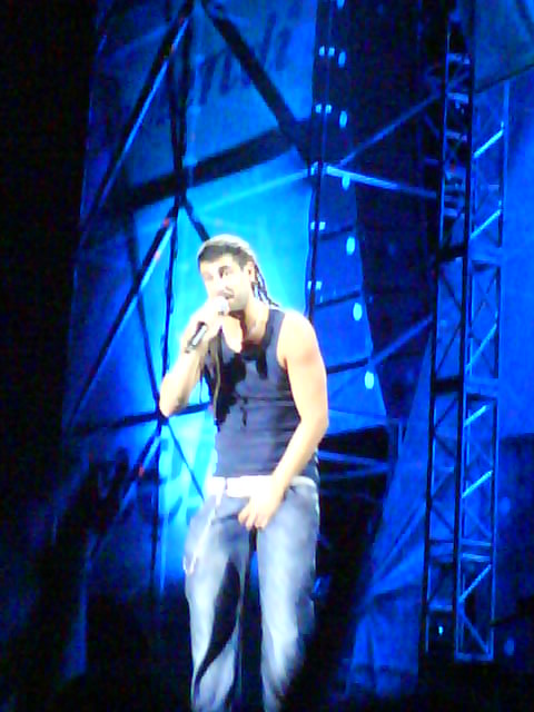 Melendi durante un concierto en Valladolid.